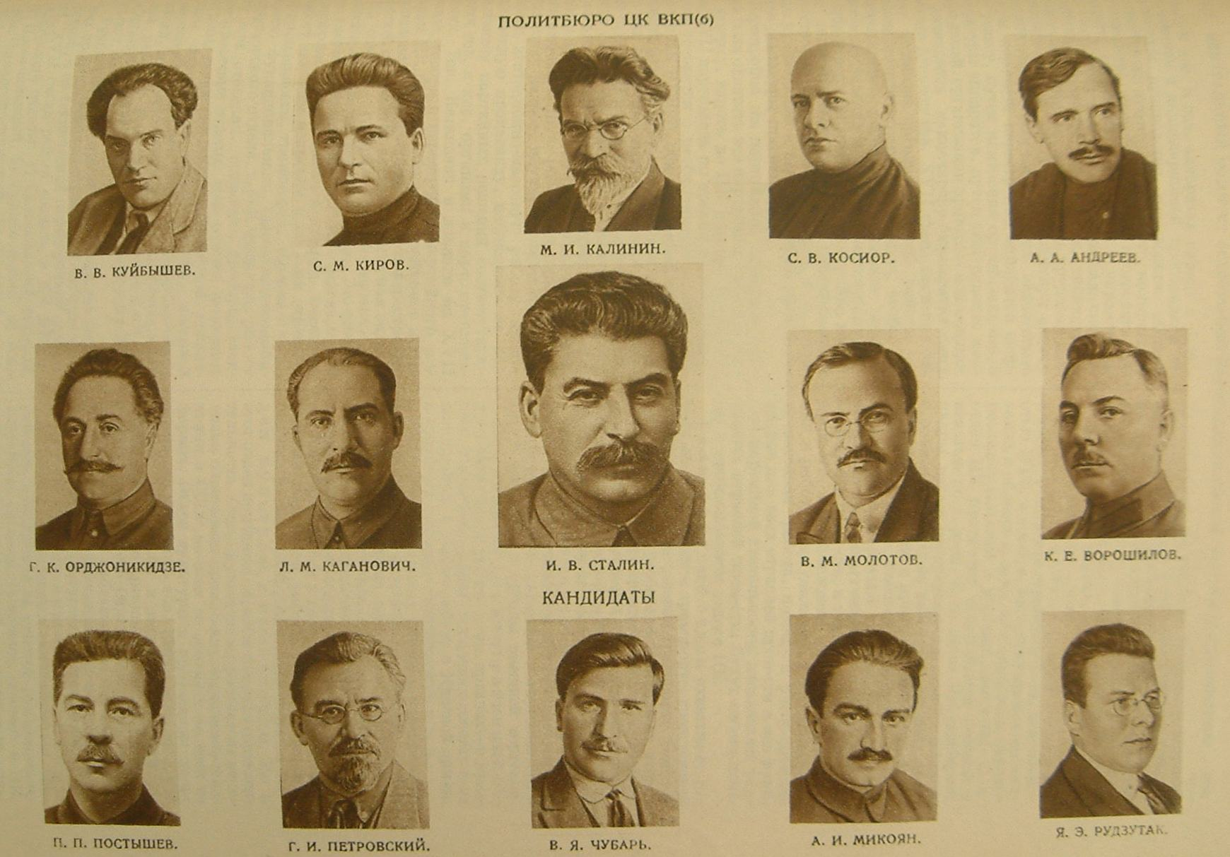 10 февраля 1934 г. Пленум ЦК ВКП(б), избранного XVII съездом ВКП(б), утвердил Политбюро в составе: члены: А.А.Андреев, К.Е.Ворошилов, Л.М.Каганович, М.И.Калинин, С.М.Киров, С.В.Косиор, В.В.Куйбышев, В.М.Молотов, Г.К.Орджоникидзе, И.В.Сталин; кандидаты в члены: А.И.Микоян, Г.И.Петровский, П.П.Постышев, Я.Э.Рудзутак, В.Я.Чубарь